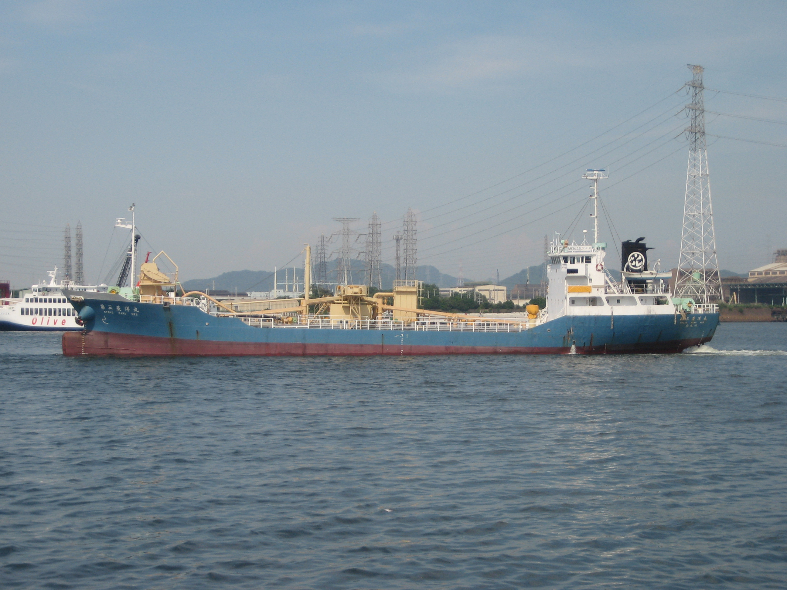 鶴丸海運株式会社所有のセメント運搬船。第三菱洋丸。姫路港にて撮影。